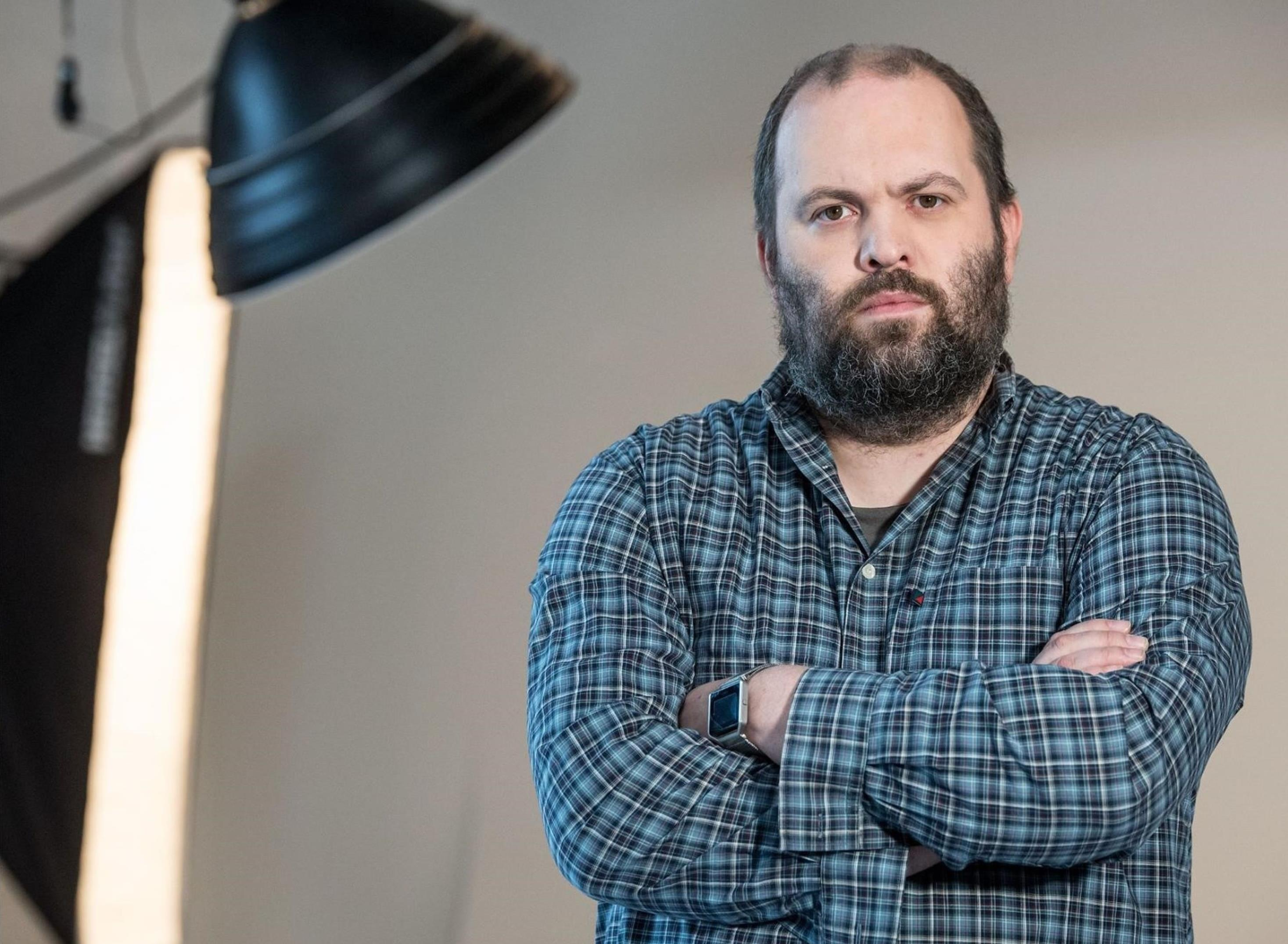 Eesti disainer Janno Siimar